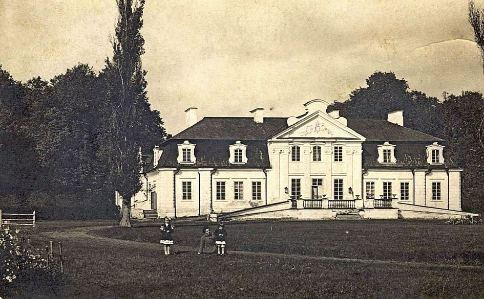 Беларуская (тарашкевіца): Ганута (Hanuta), сядзіба Агінскіх (Aginski)